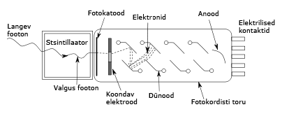 Fotokordisti